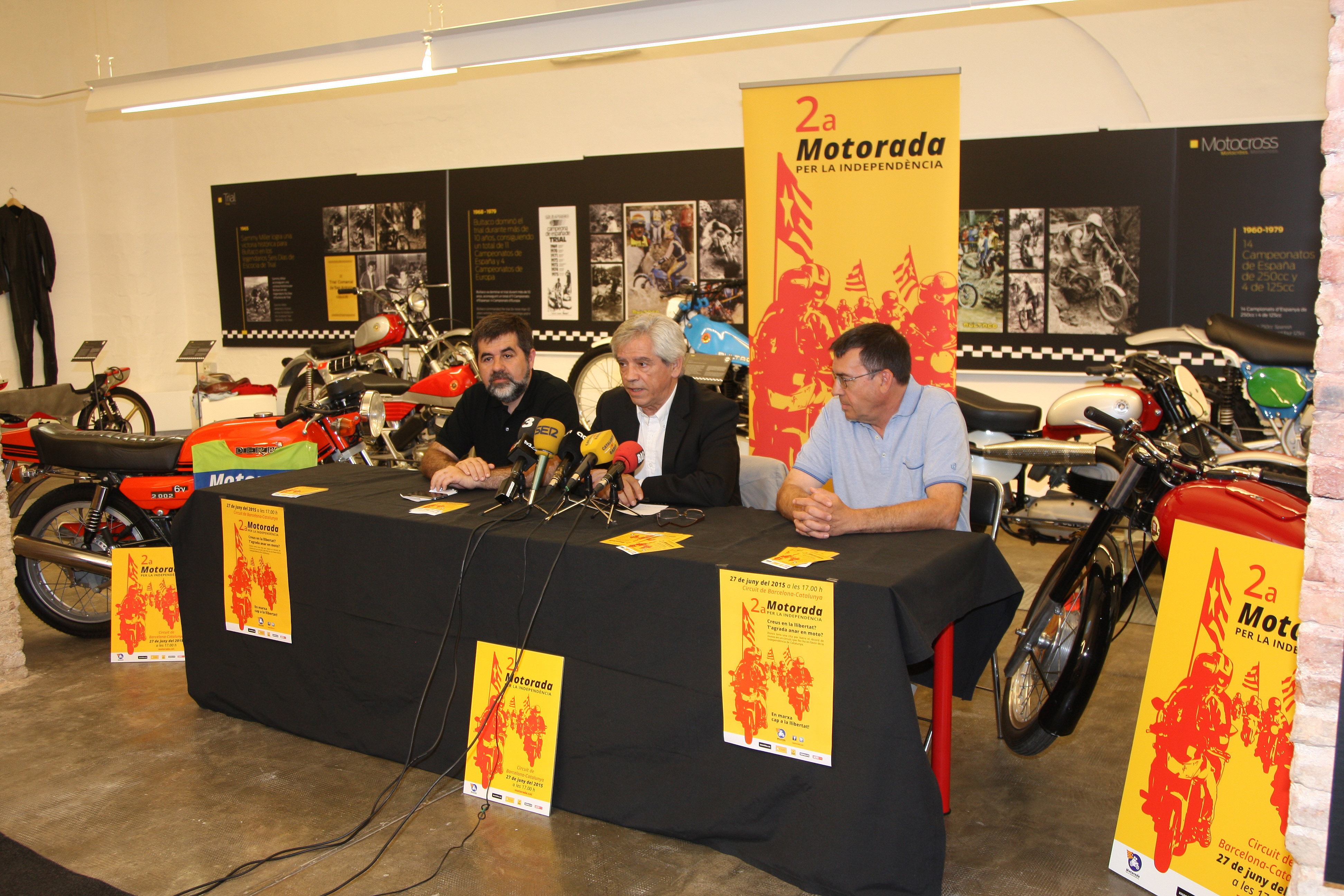 Presentació